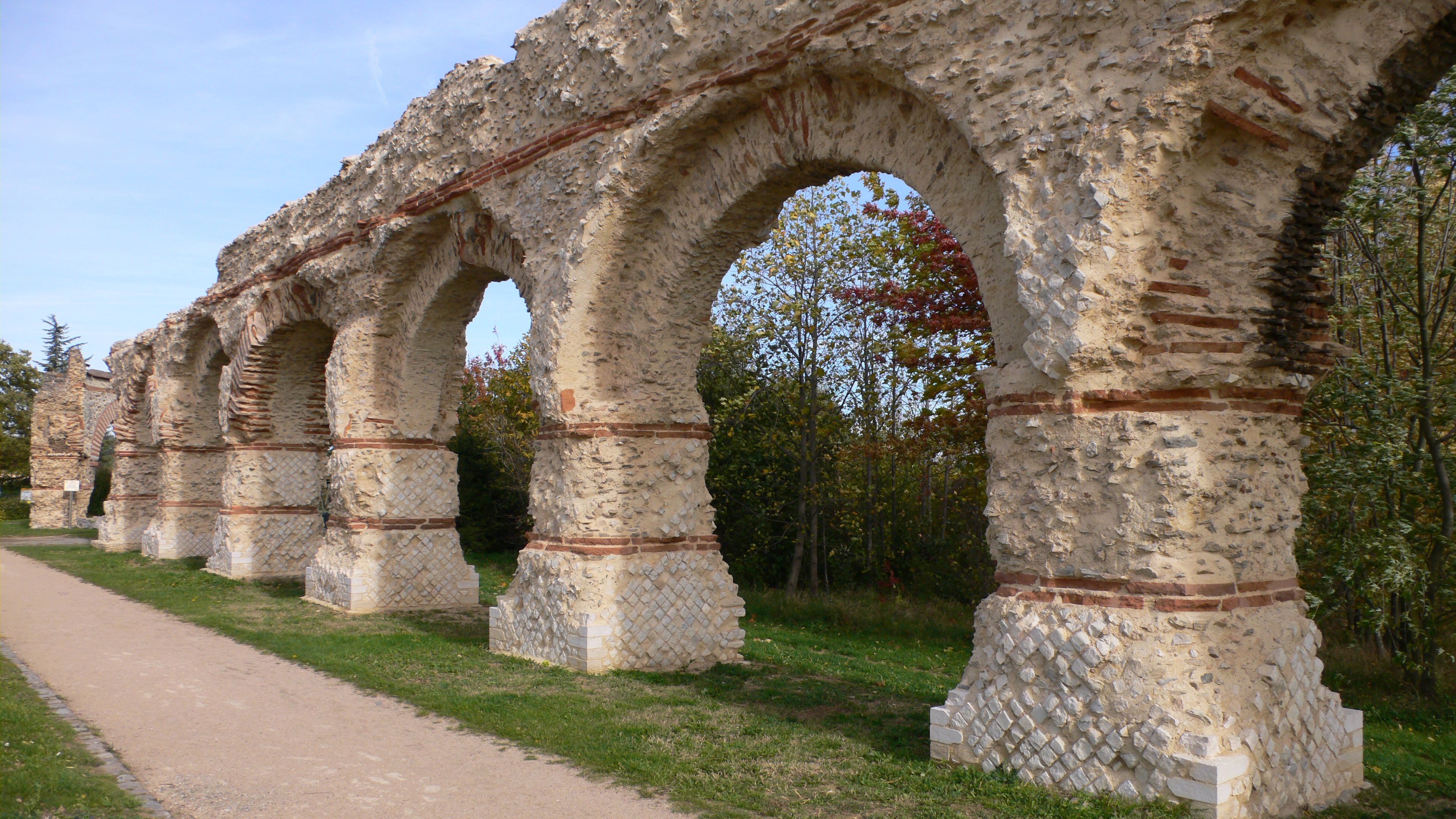 Aqueduc du Gier - Chaponost - Série d'arches après rénovation 2009-2010